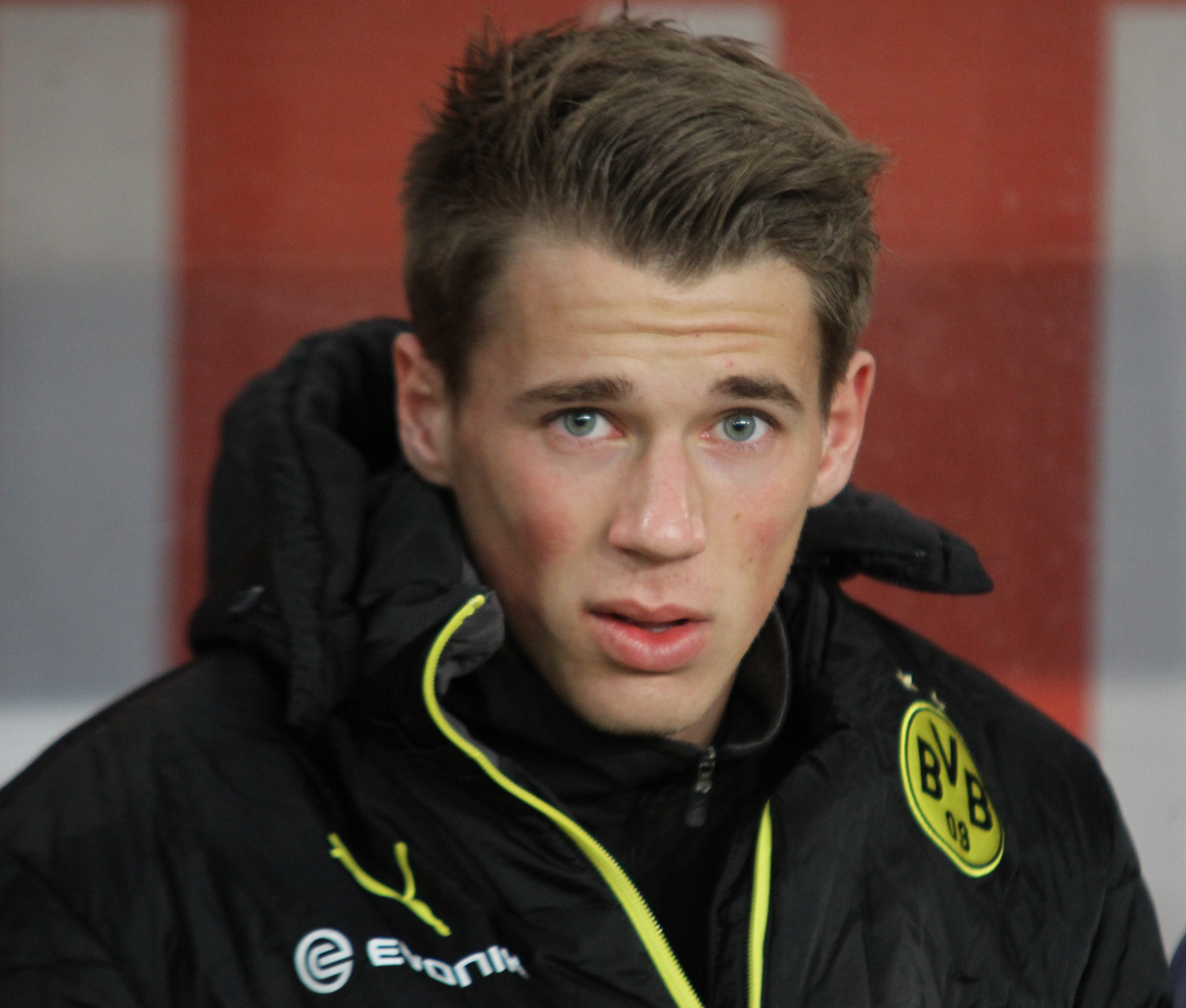 Erik Durm (Borussia Dortmund)